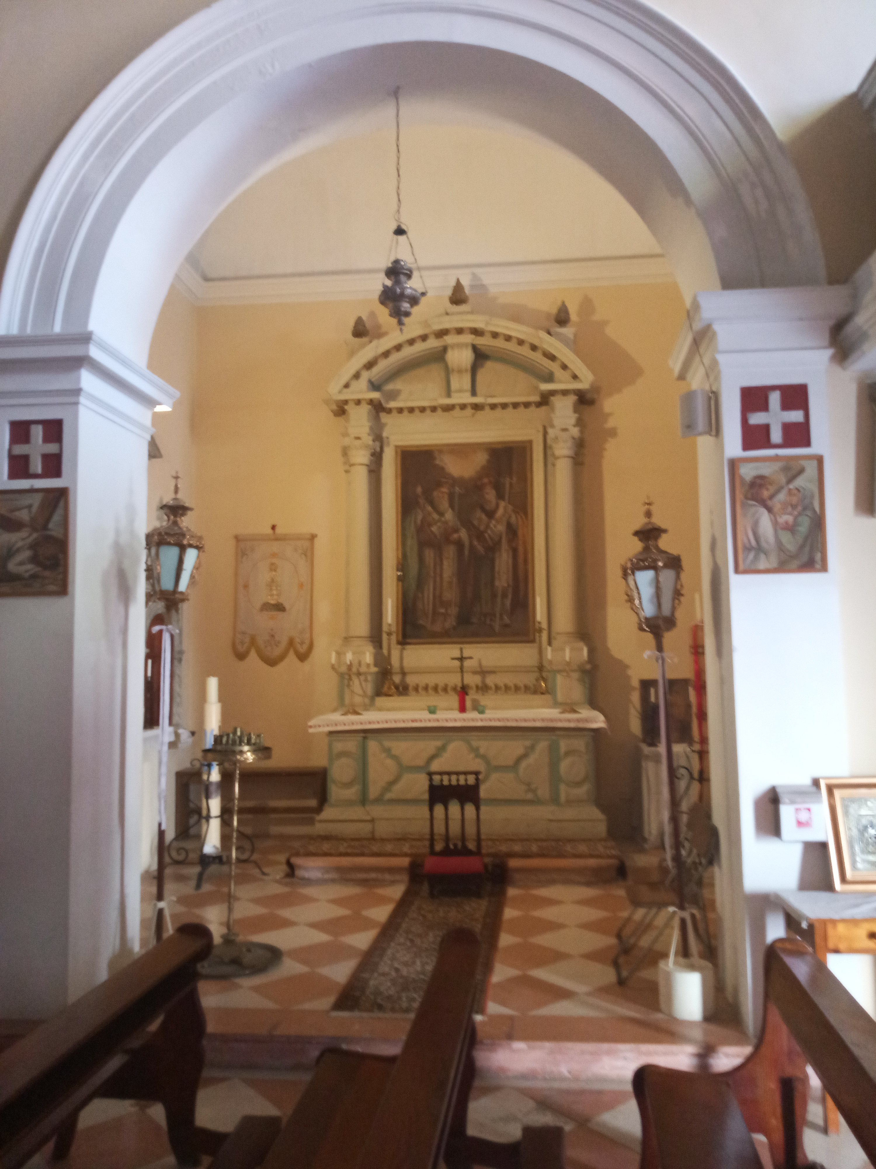 Собор Святого Якова та Святого Христофора, м. Керкіра, о. Керкіра, Греція